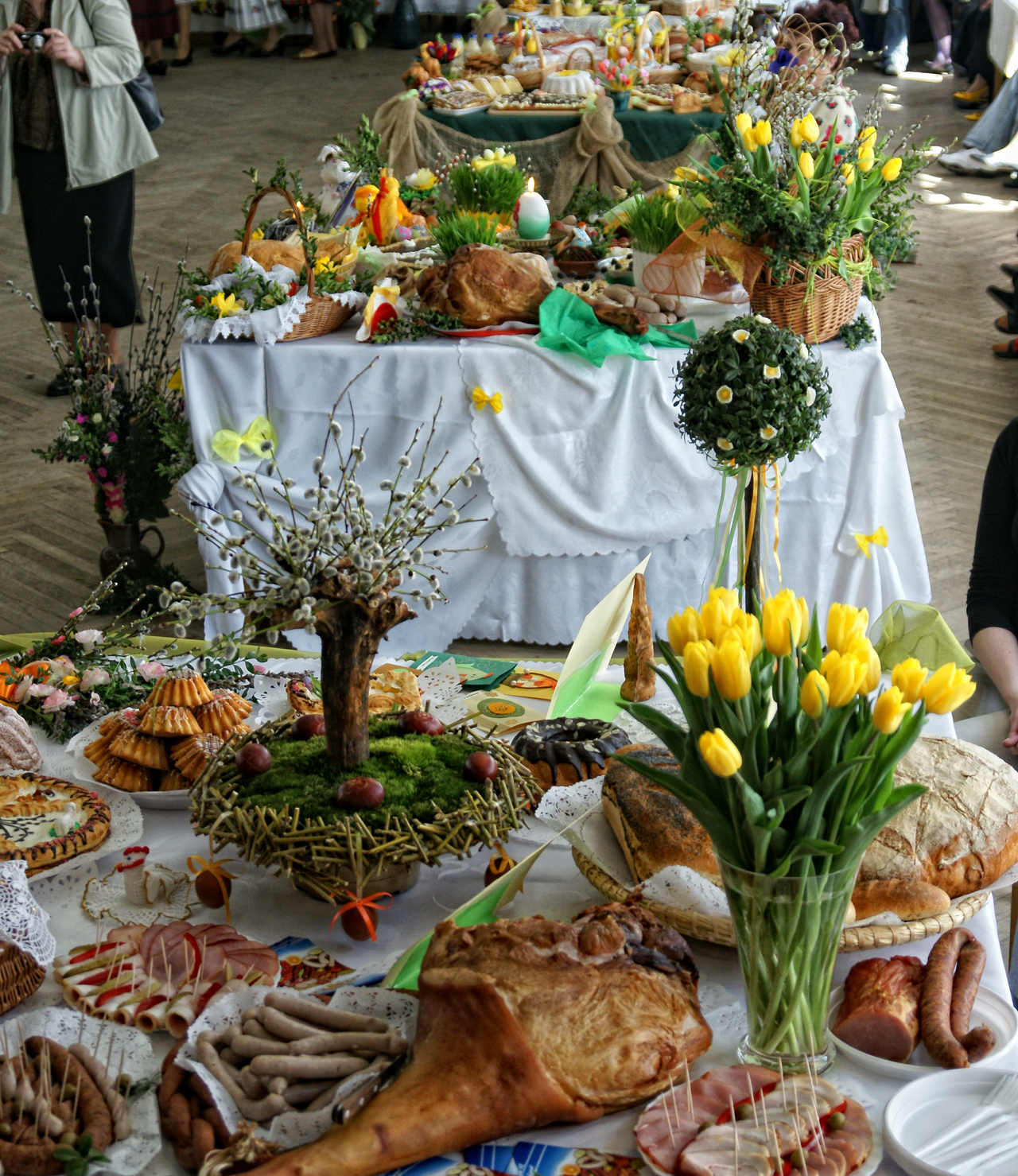 stoły wielkanocne